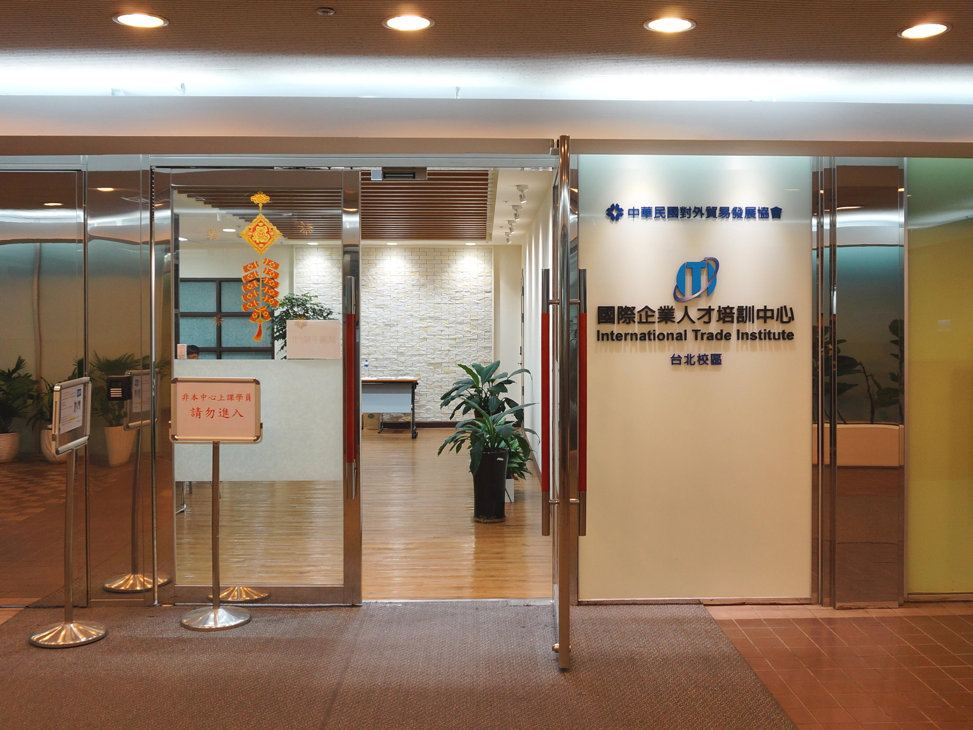 中華民國對外貿易發展協會國際企業人才培訓中心臺北校區，位於臺北世界貿易中心展覽大樓2樓。